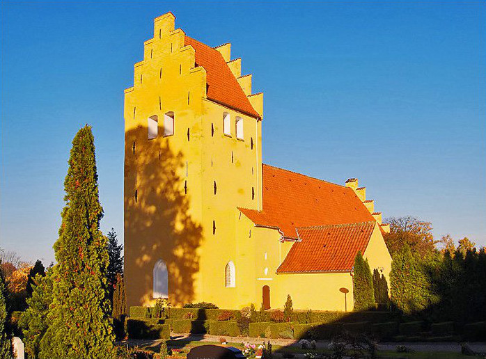 fra sydvest